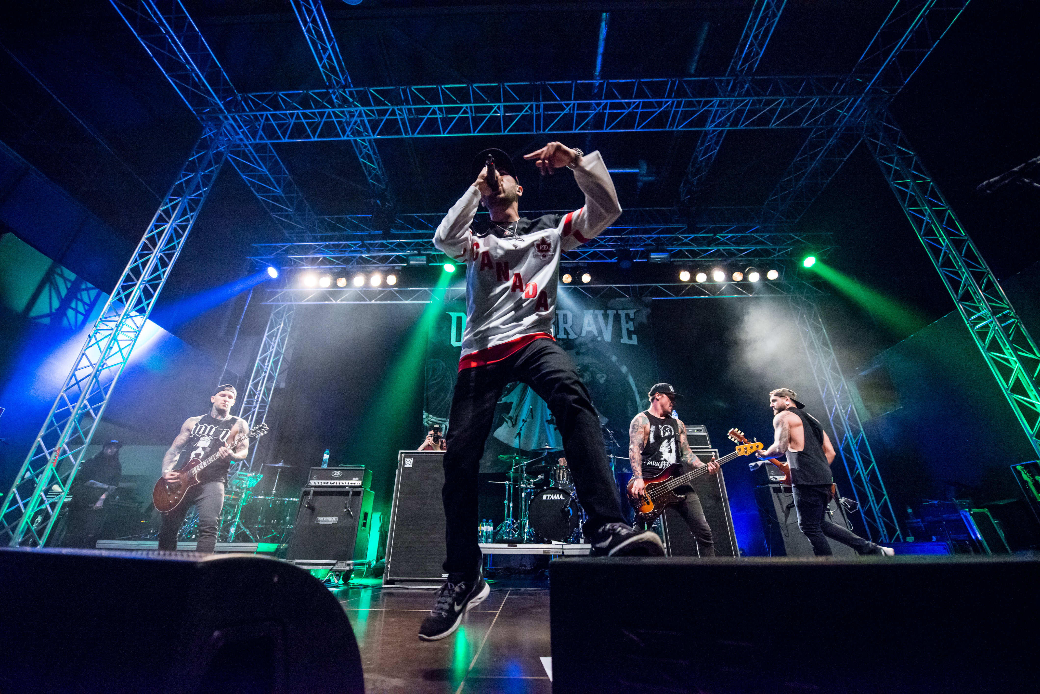 'Impericon Festival 2015; Oberhausen Turbinenhalle': 'Obey the Brave'